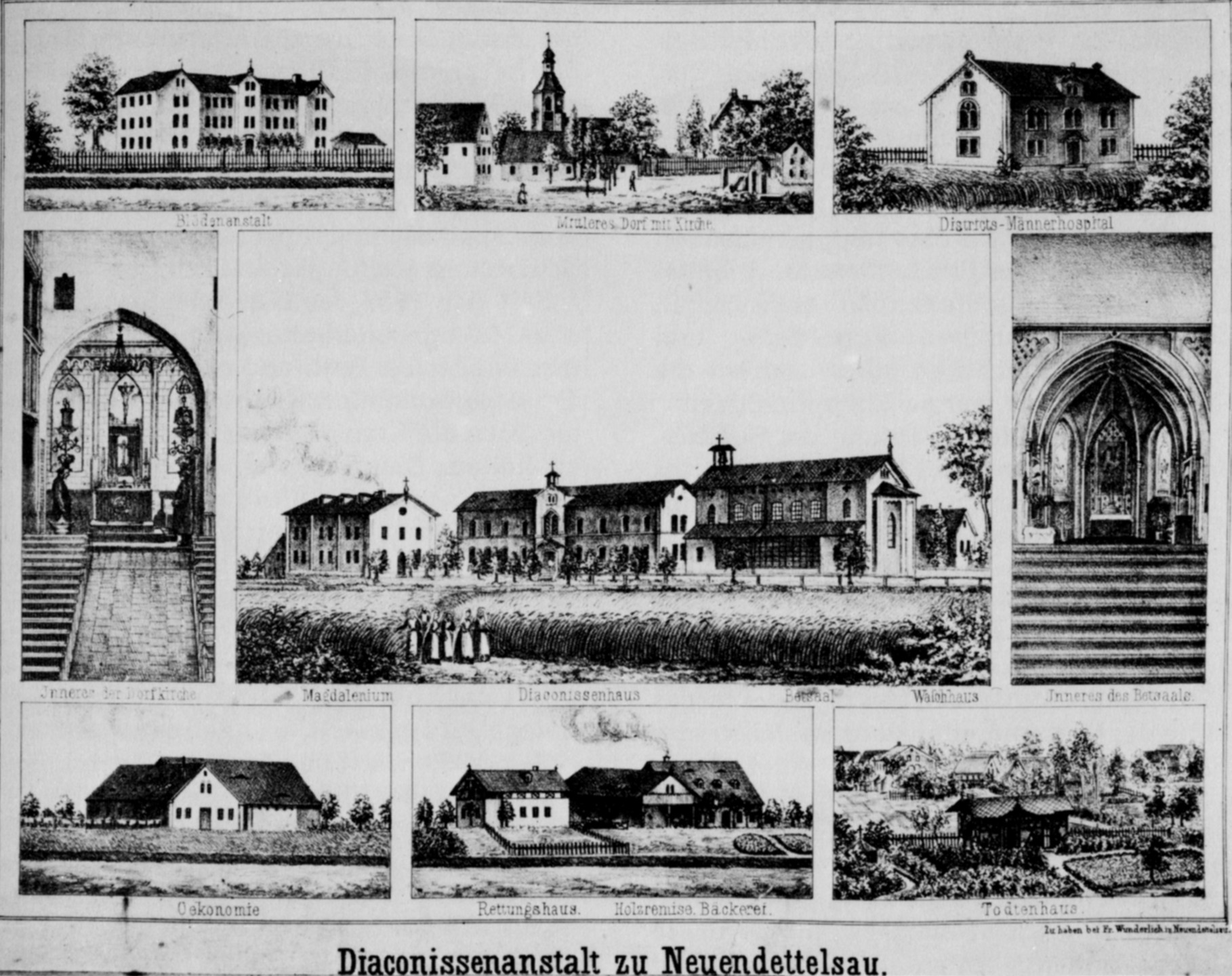 Potpourri-Bild der "Diaconissenanstalt zu Neuendettelsau"